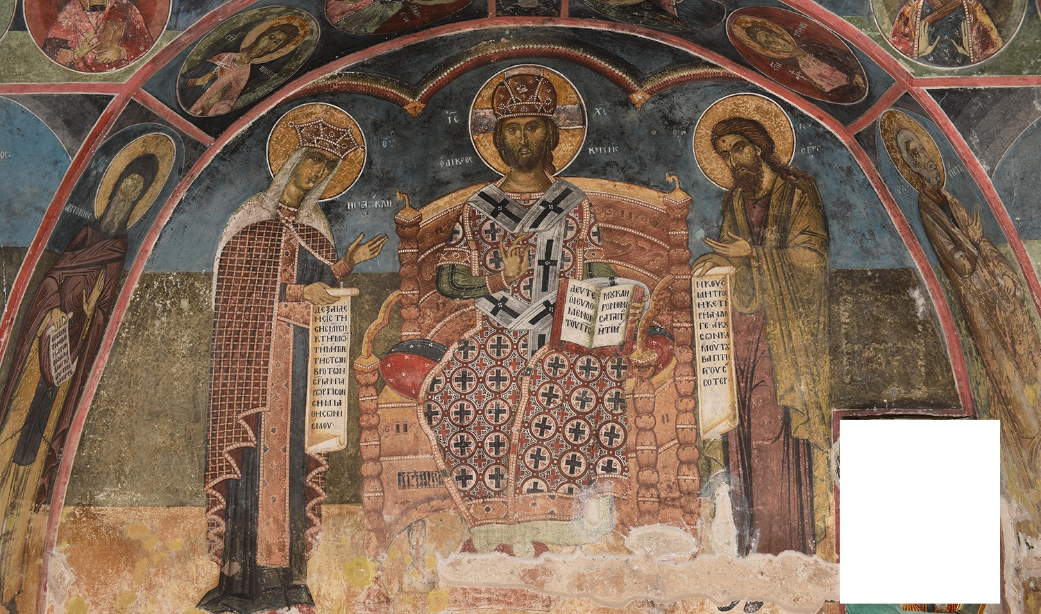 Христос Цар и Велик Архиерей, фланкиран от Богородица Царица и Свети Йоан Предтеча. (наос, Църква „Свети Никола Топлички“, 1537 година.)